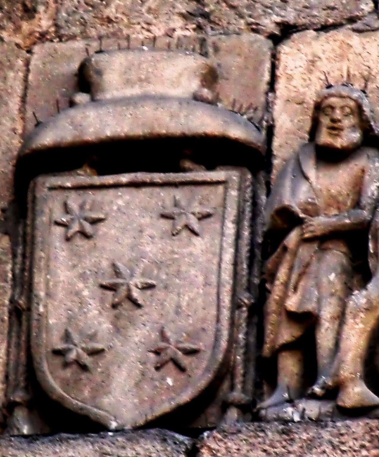 Escudo de Armas del Obispo Fonseca-Coutiño en la Catedral de Ourense 1470